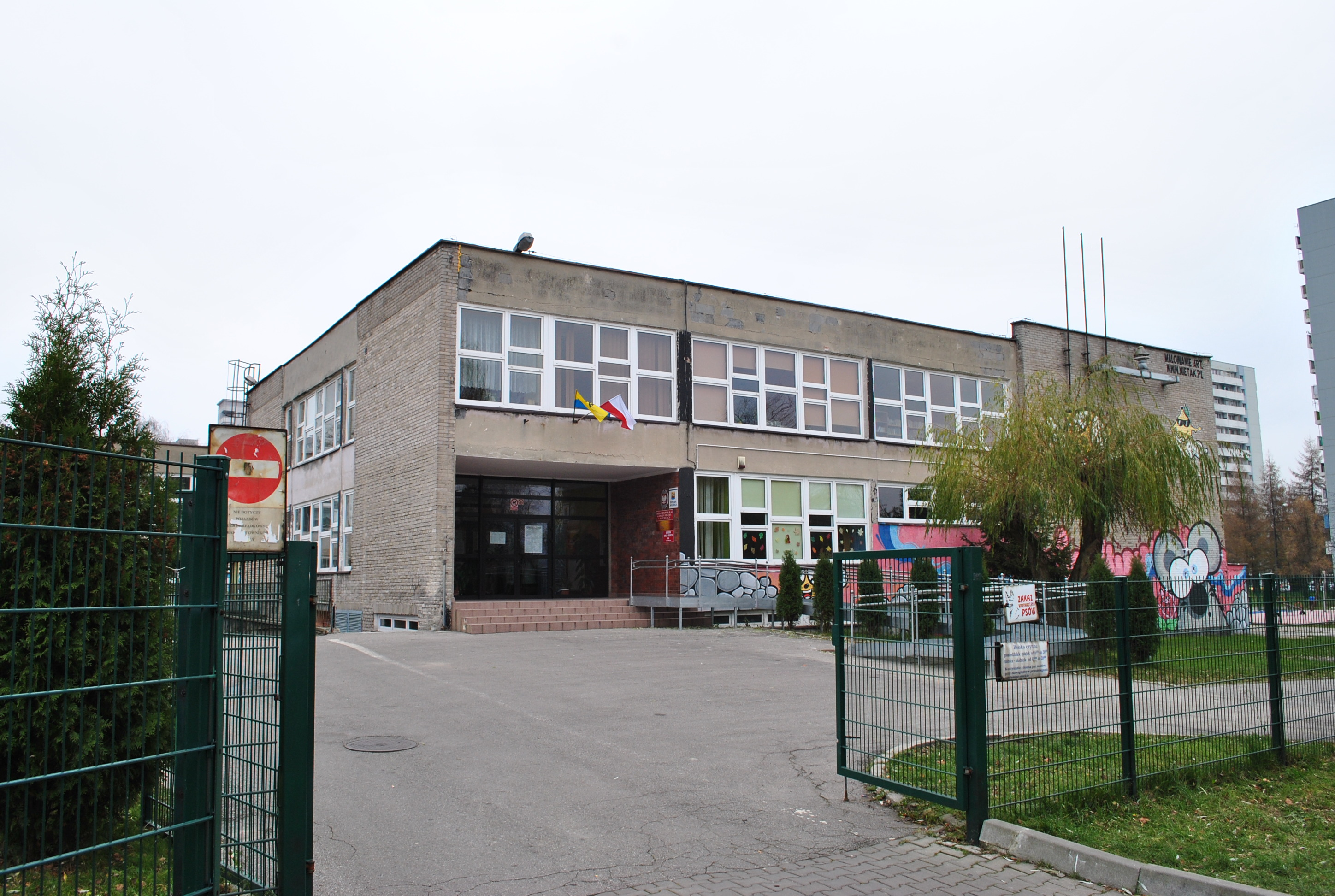 Katowice, Osiedle Tysiąclecia. Szkoła Podstawowa Nr 66 im. Janusza Korczaka